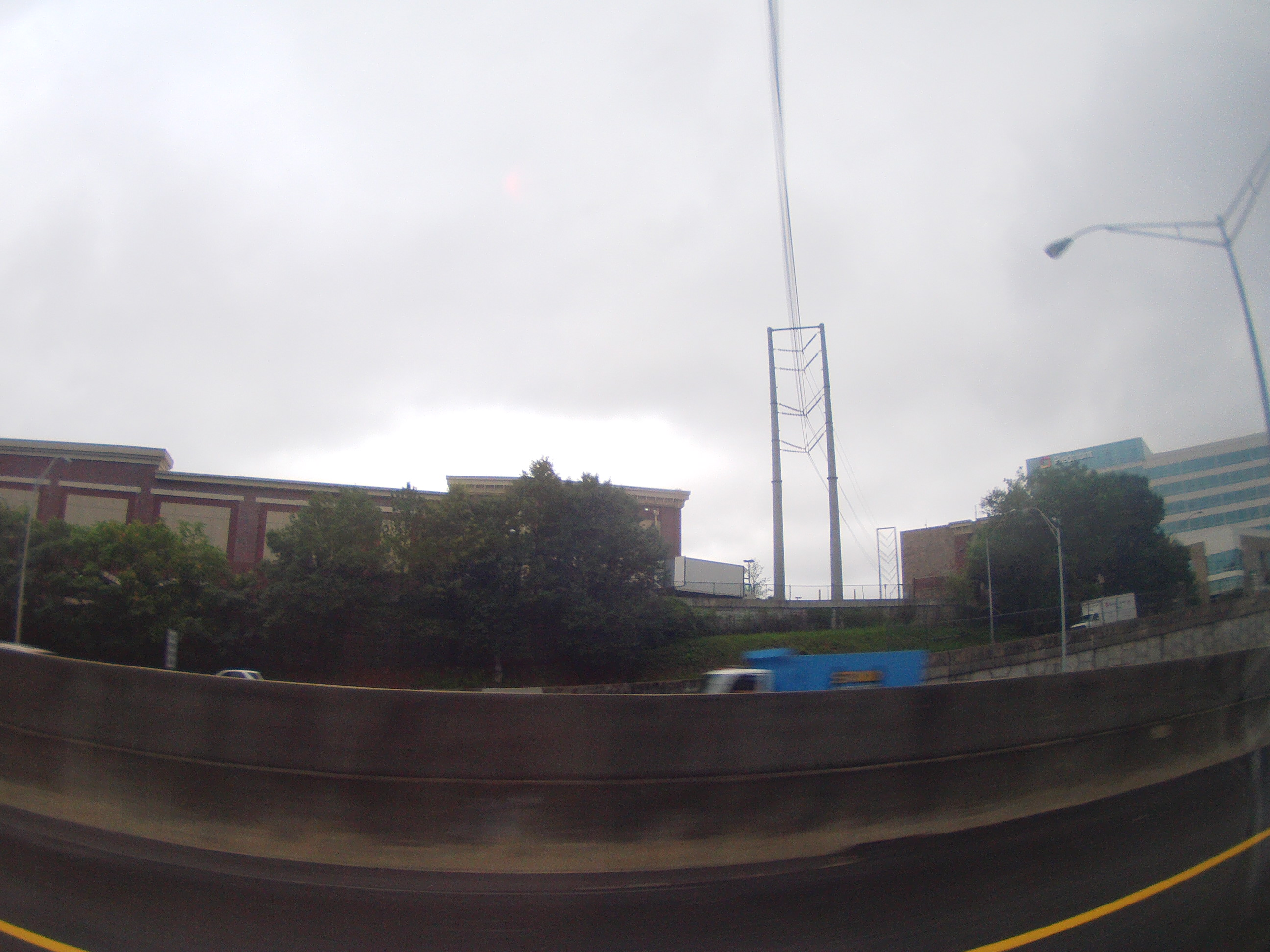 Berkeley Park, Atlanta, GA 30318, USA